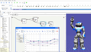 תוכנת choregraphe